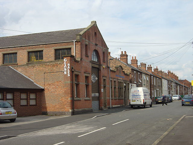 Isandula Road